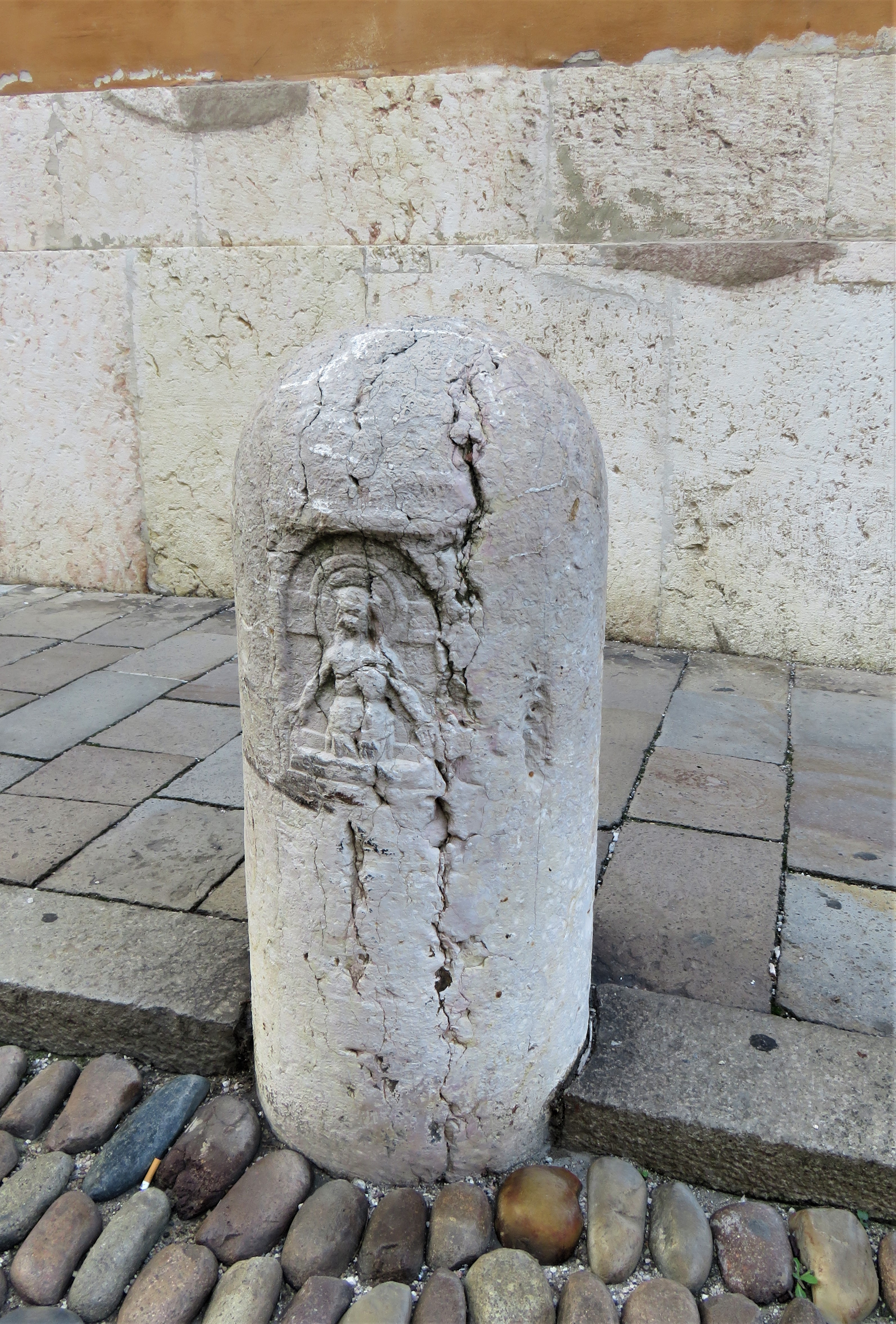 Ecce Homo su un paracarro in corso Ercole I d'Este, nella zona dell'ex Monte di Pietà ed ex palazzo della Borsa